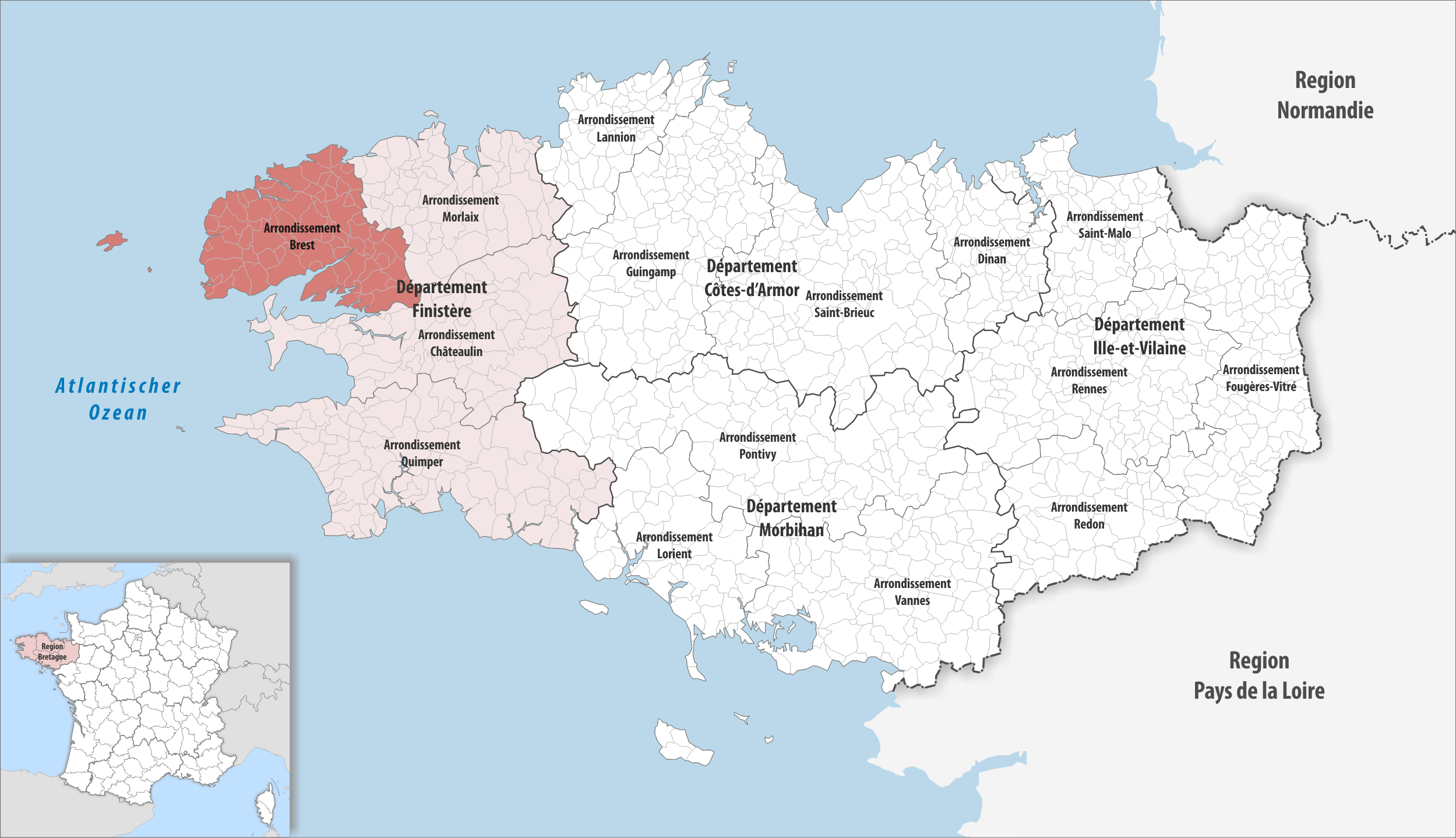 Lage des Arrondissements Brest